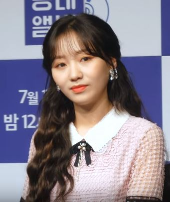 9일 오후 서울시 영등포구 여의도 서울마리나에서 TV조선 '동네앨범' 제작발표회가 열려 러블리즈 수정이 기자의 질문에 답변을 하고 있다.